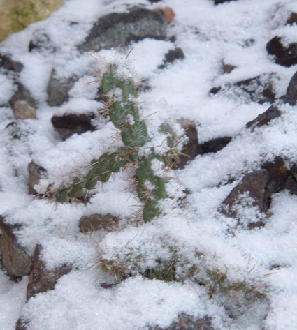 Cylindropuntia imbricata